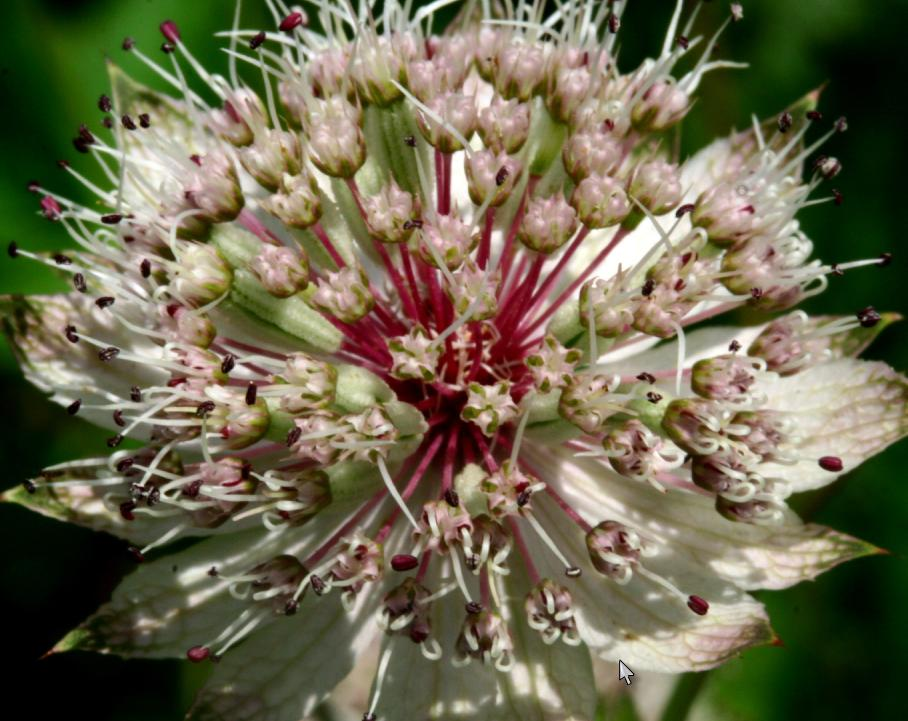 Astrantia major